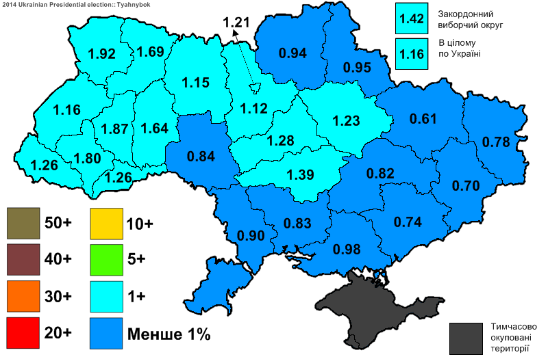 Електоральна підтримка Тягнибока Олега Ярославовича на виборах Президента України 2014.